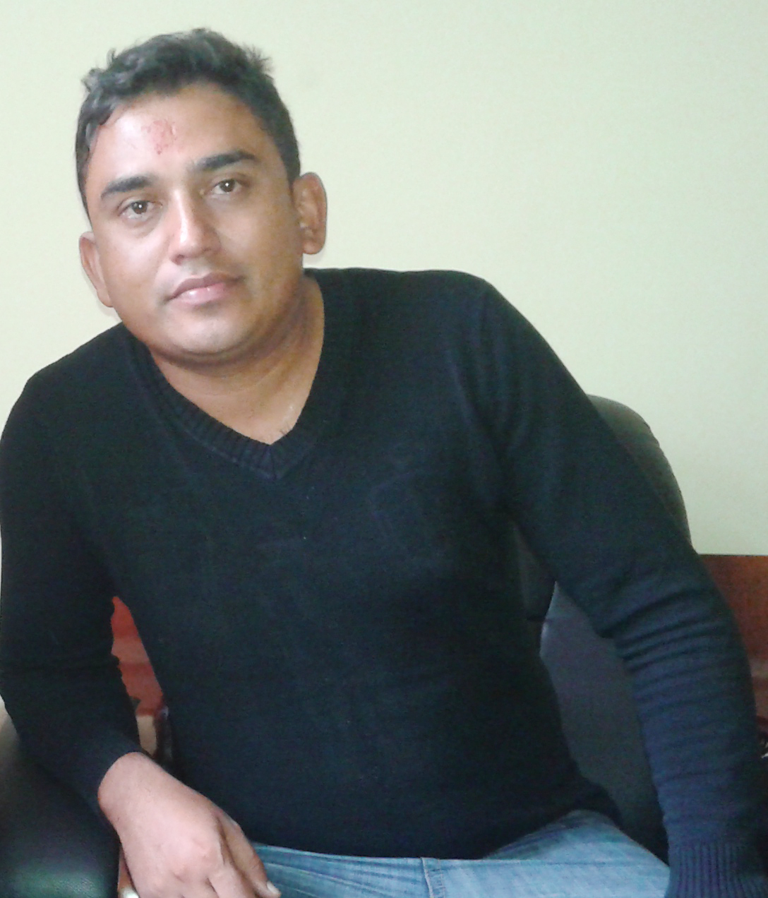 नेपाली: सिताराम कट्टेल, Nepal